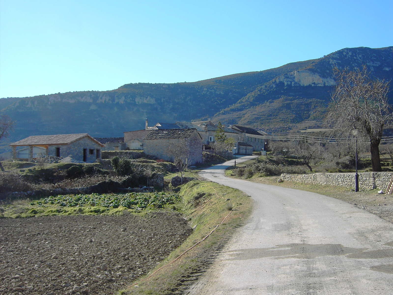 Vista general del Núcleo de Santa María de la Nuez, en el Viello Sobrarbe.